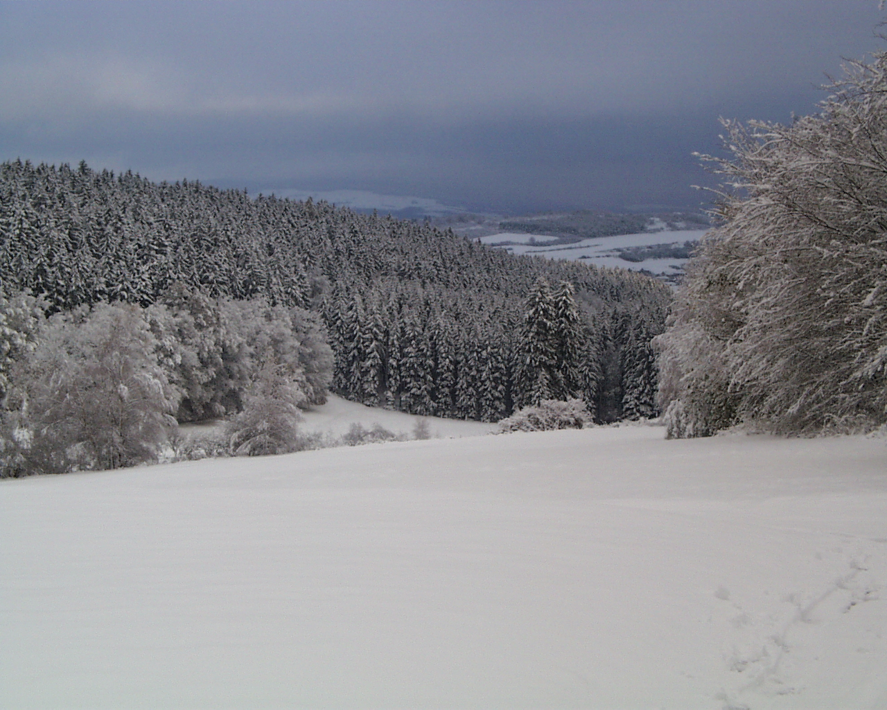 Seutebornwiese unterhalb des CVJM-Haus Solling in Dassel im Winter 2004